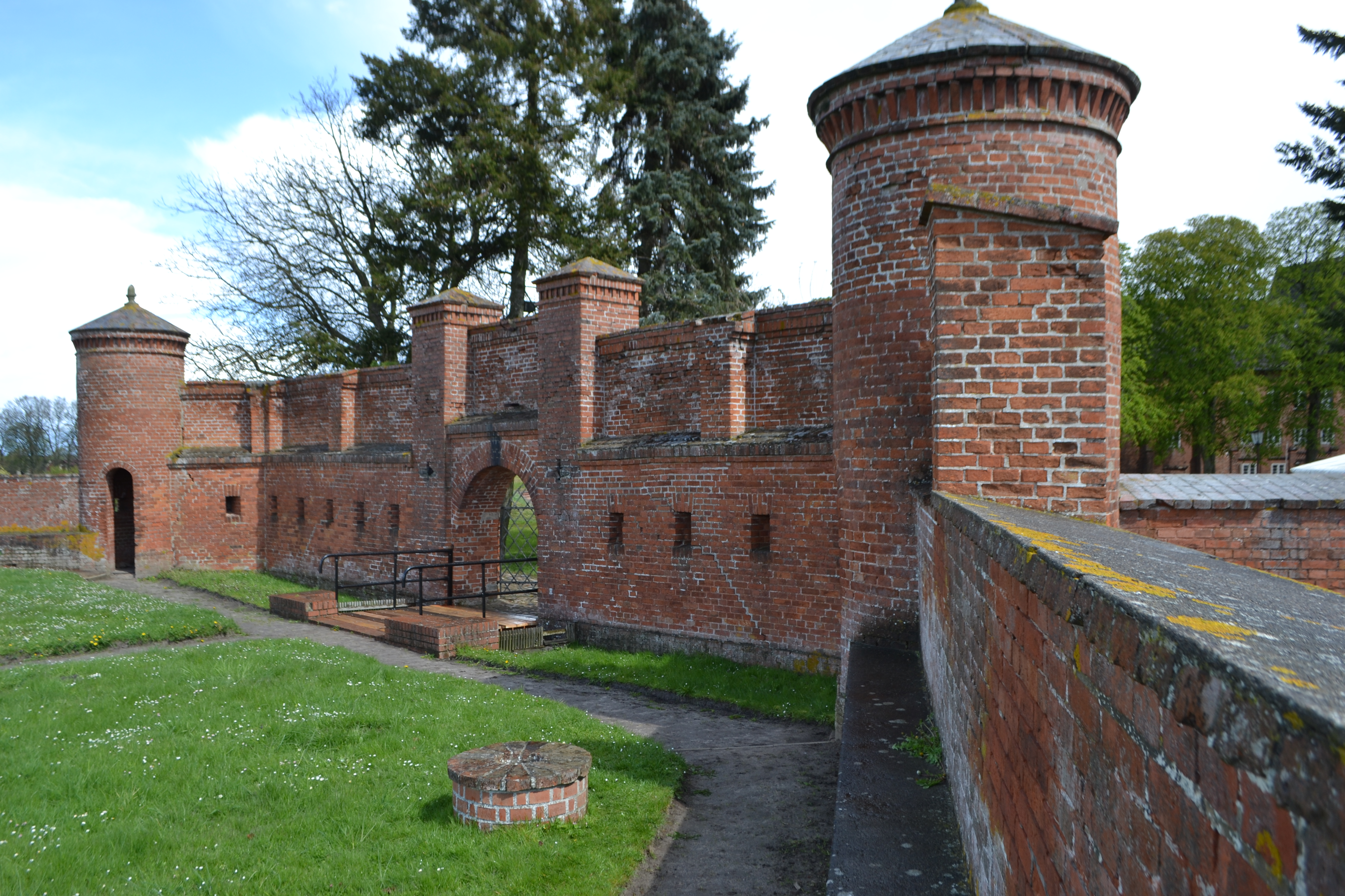 Festungsmauer Dömitz